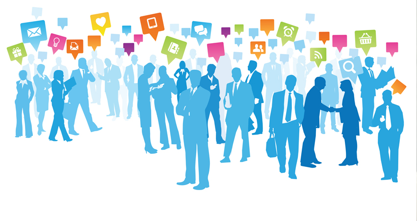 sociales para la sociedad